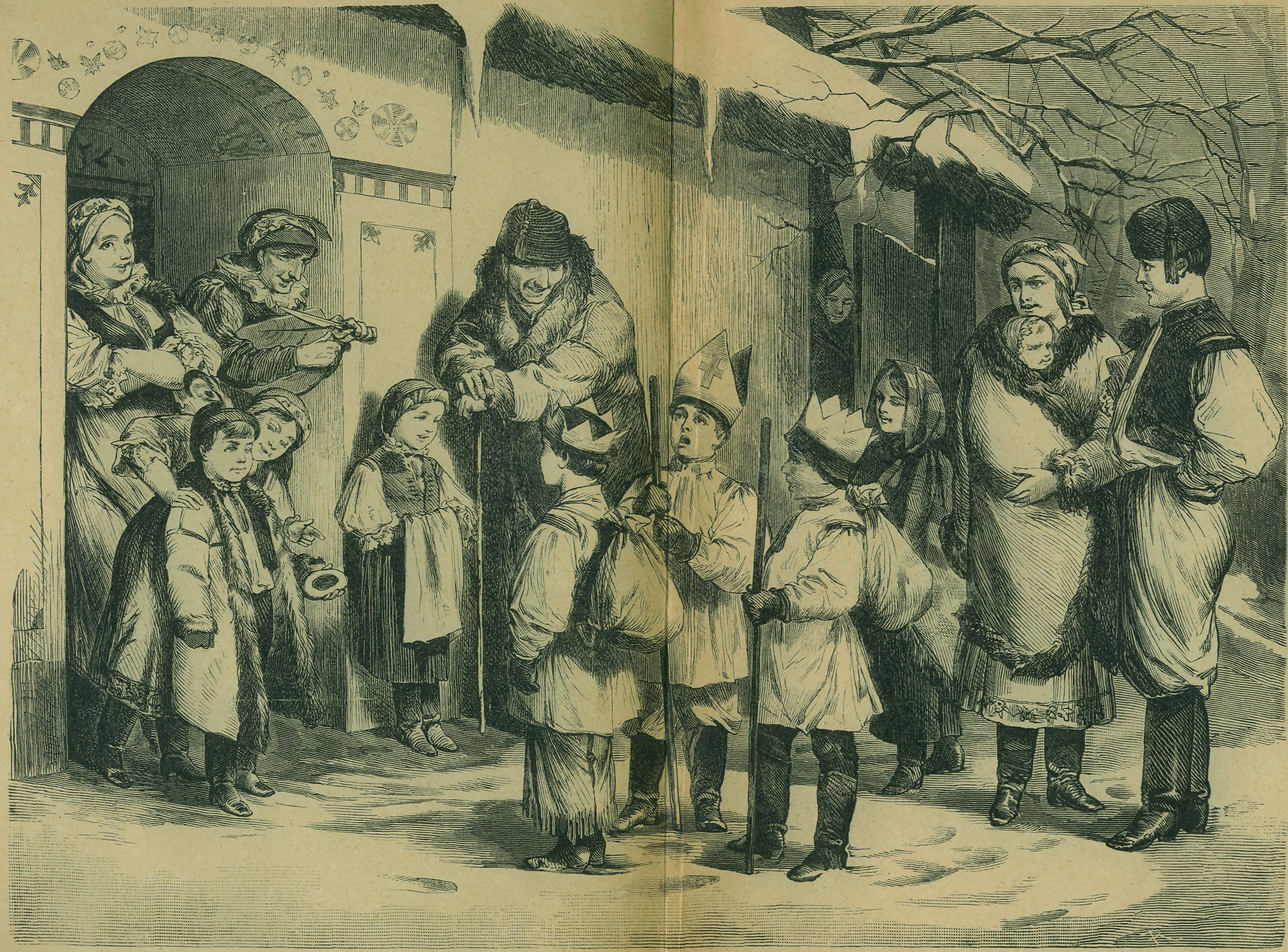 «Три короля». Словакия. 1870